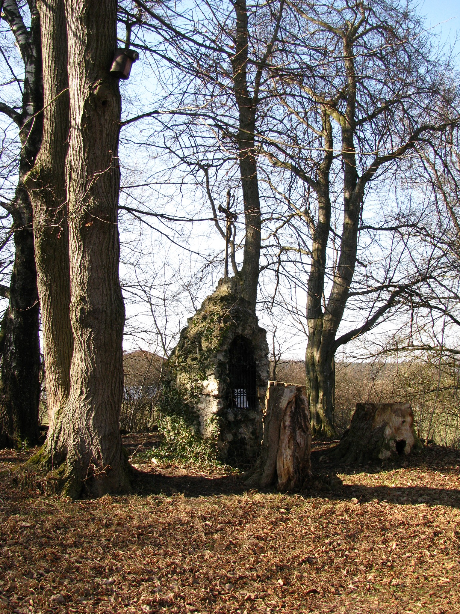 Burgstall Alling, Mariengrotte